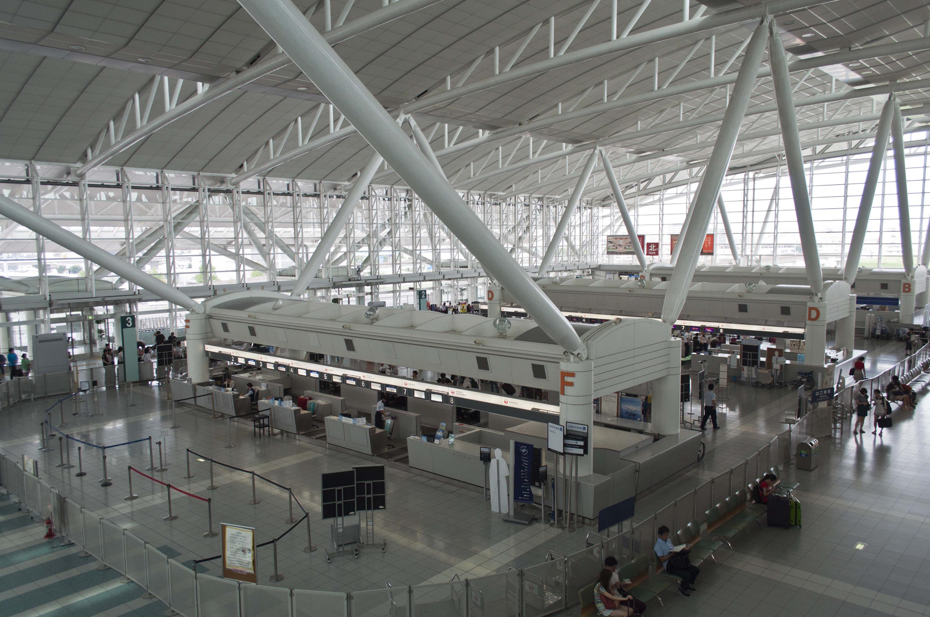 福岡空港国際線ターミナルの出発フロア